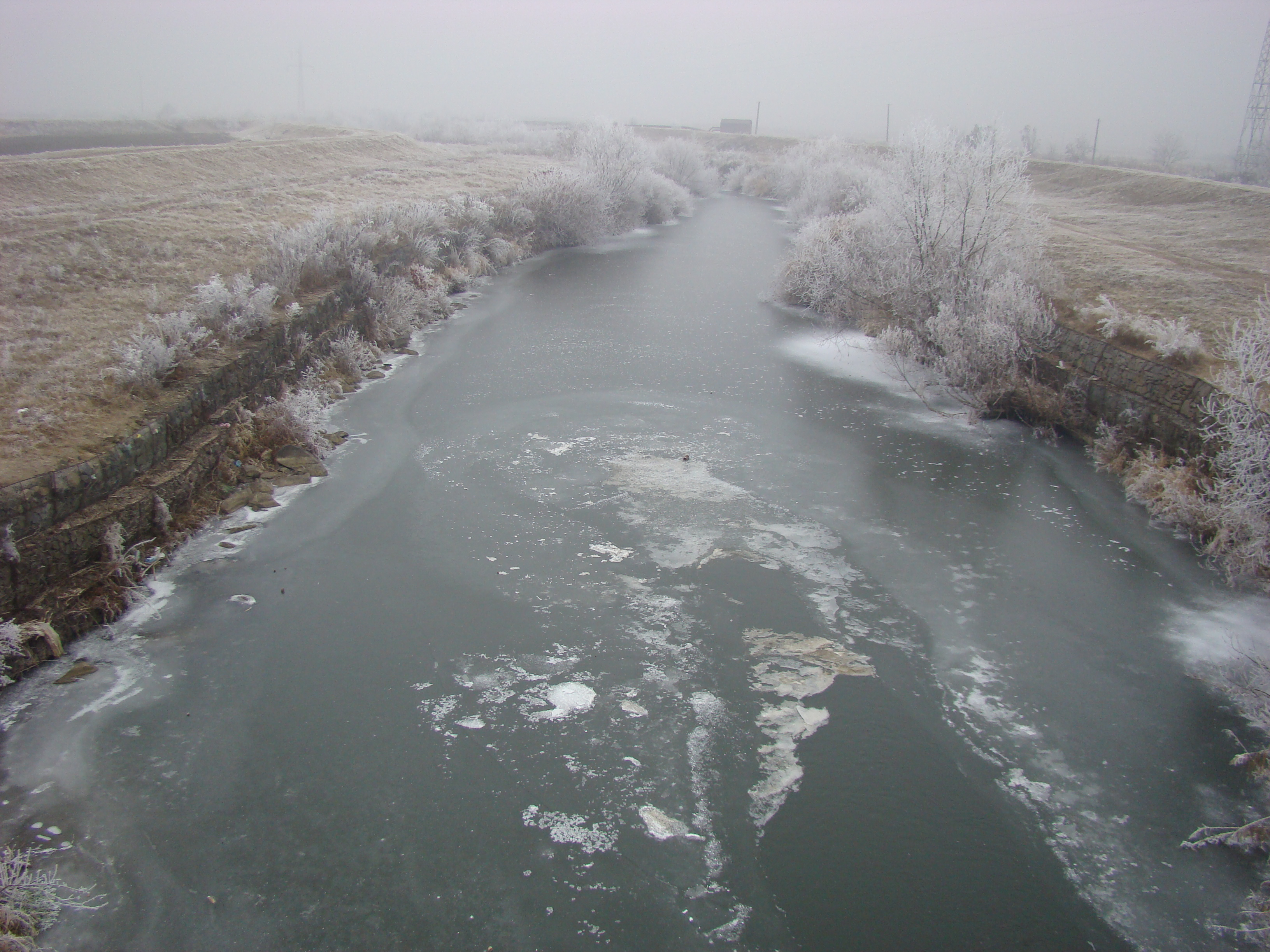 Crasna, Derșida, județul Sălaj